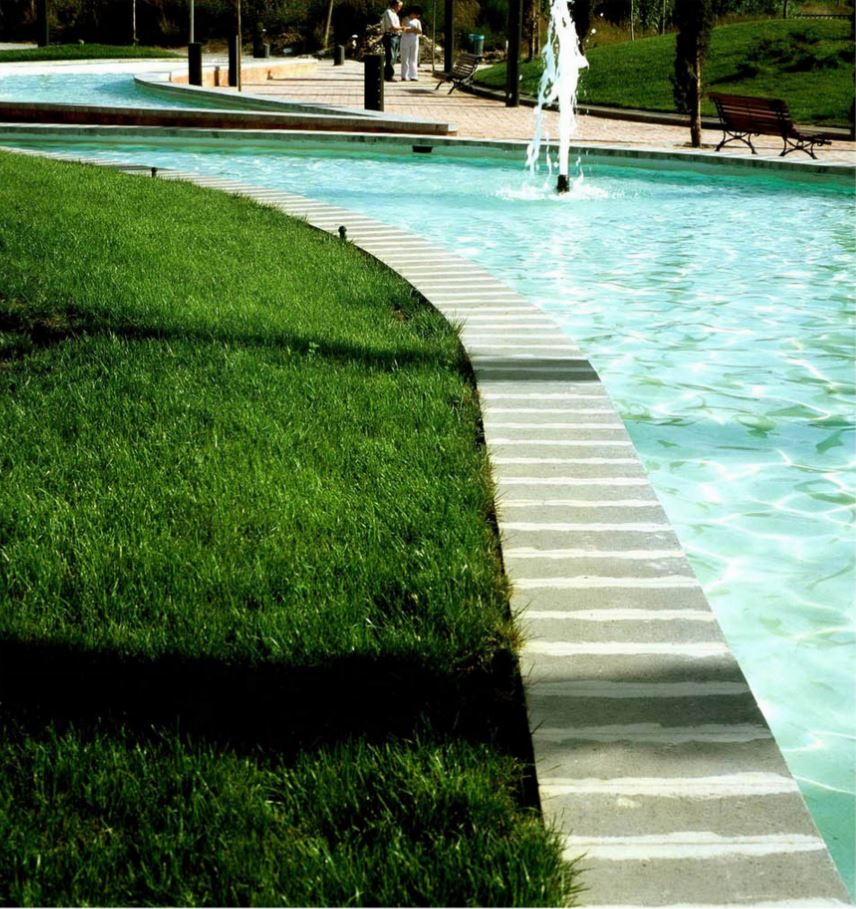 Estanques